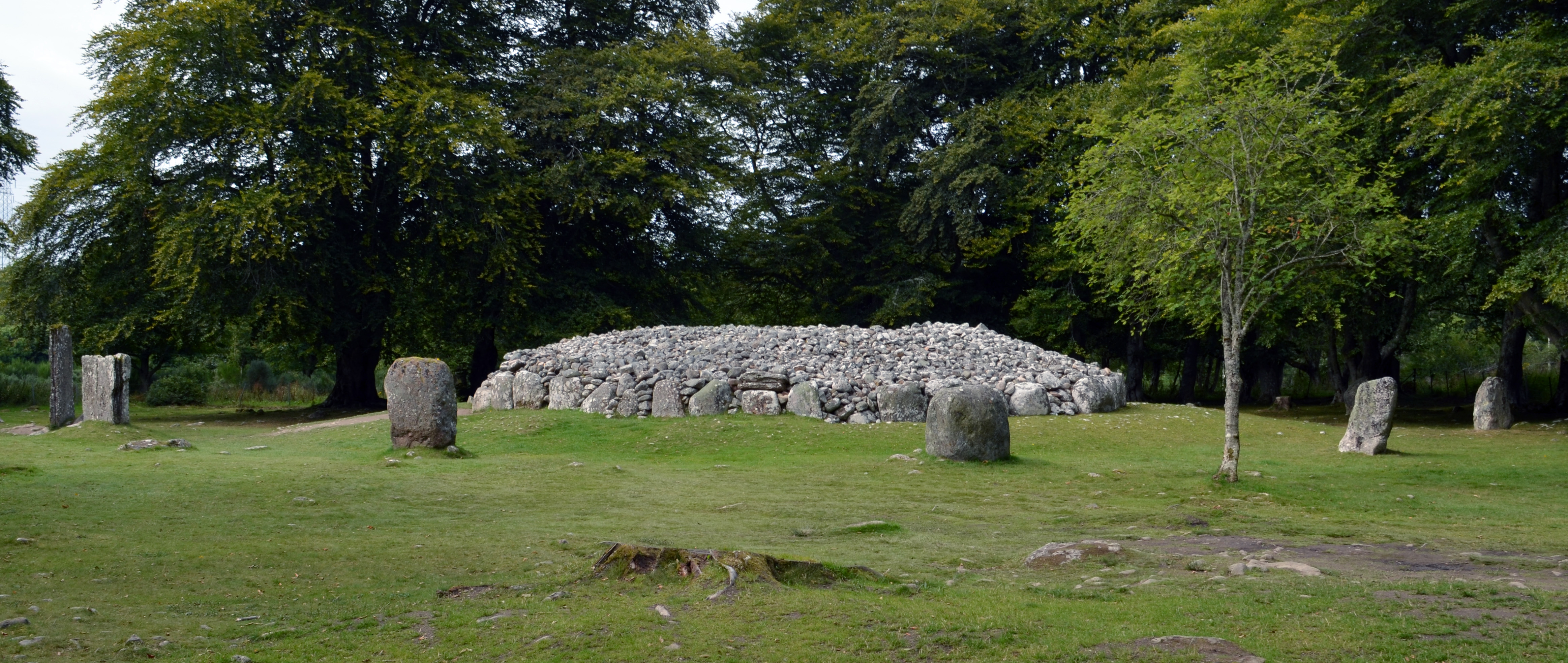 Balnuaran of Clava, Nordost-Cairn